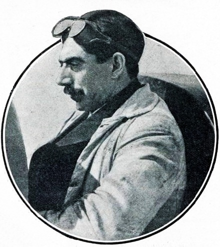 Fred Marriott (1906, pilote Stanley) - La Vie au Grand Air du 9 février 1906, p.103